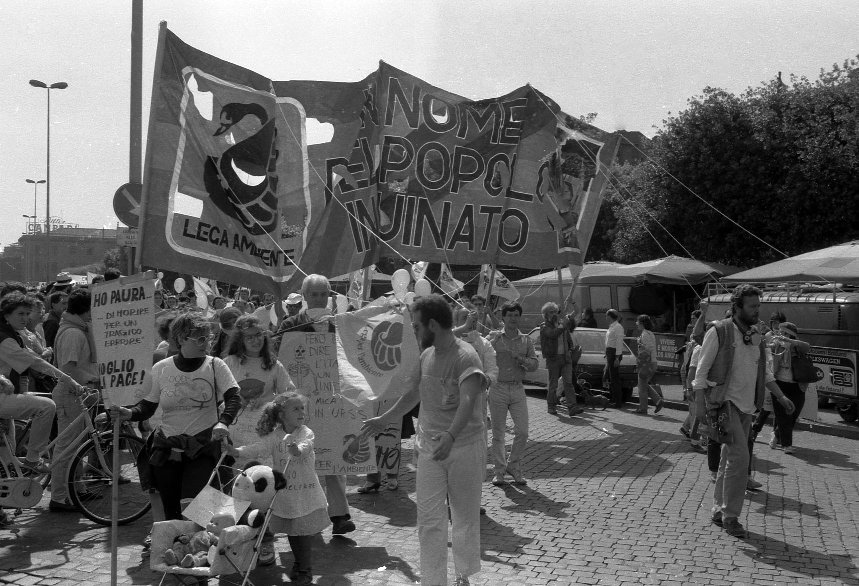 Lega Ambiente manifestazione antinucleare Roma 1986